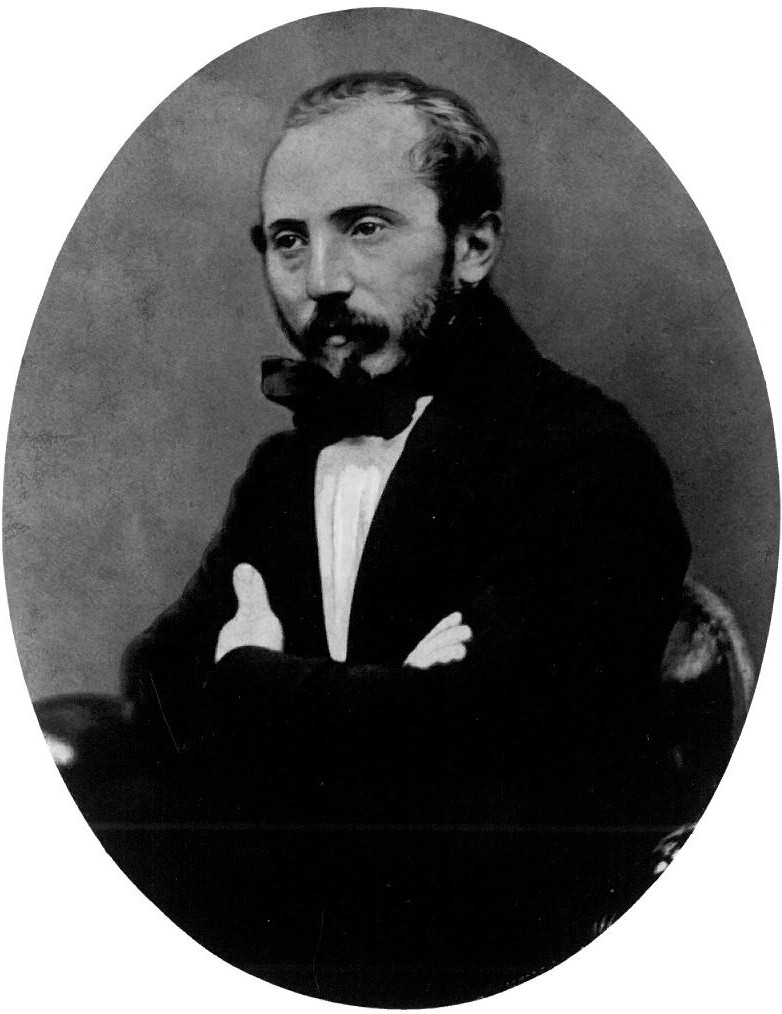 Porträt von Albert Güldenstein, Reproduktion eines Fotos, das angeblich um 1870 entstand, Orignalfoto verschollen.